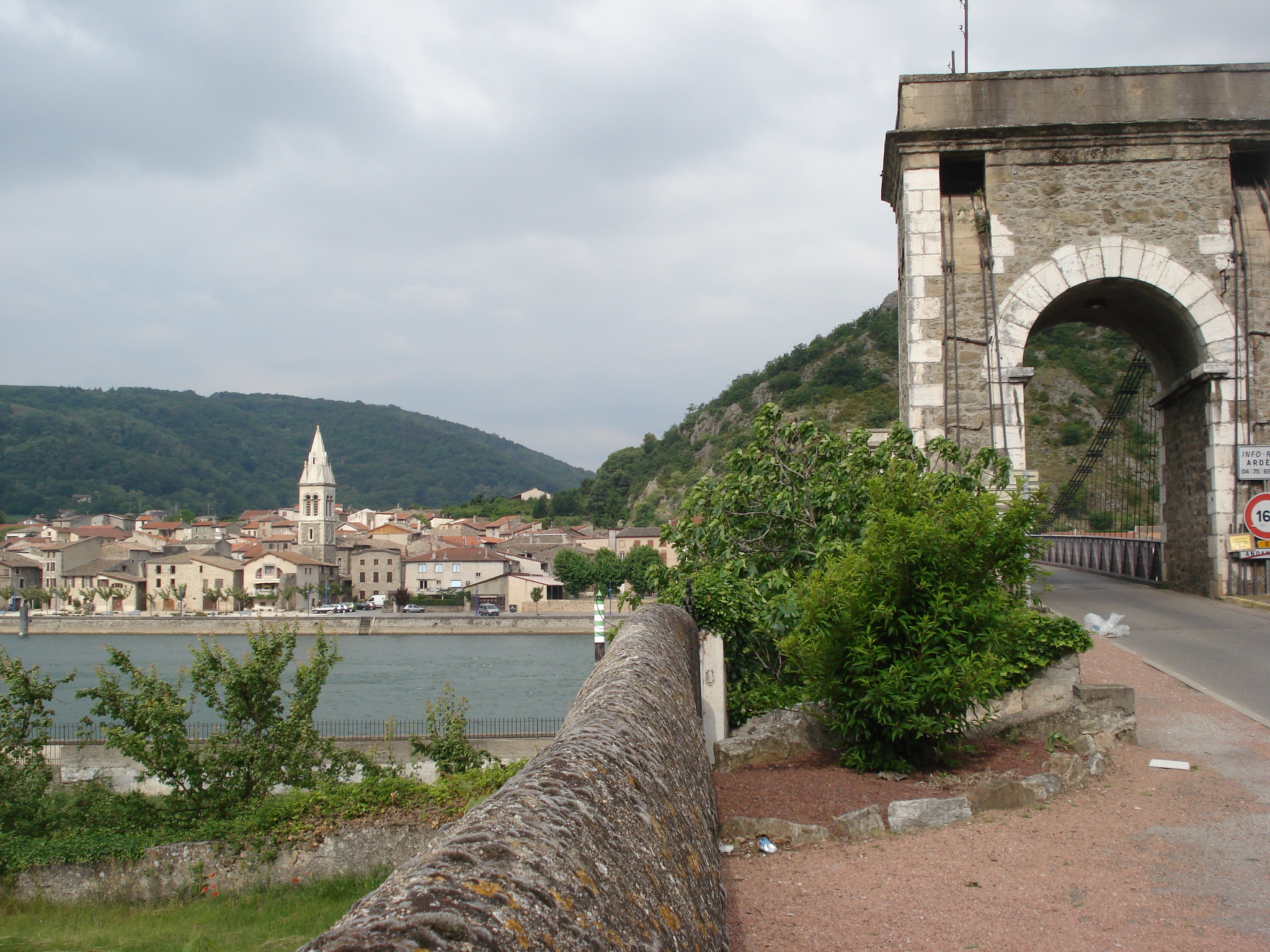 Andance en Ardèche